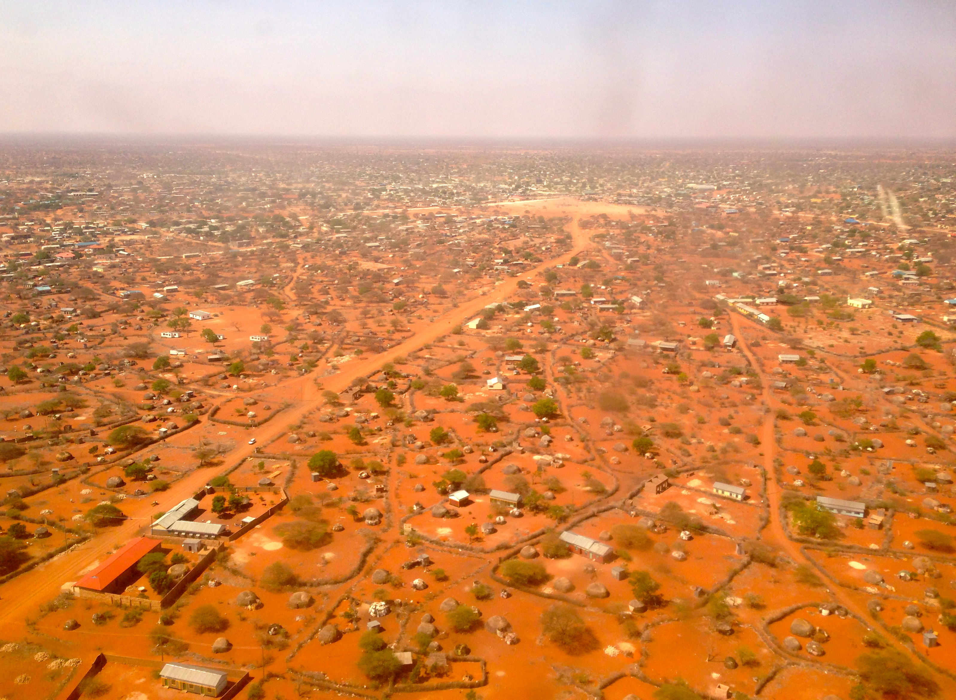 დაბა ვაჯირის ცენტრი, თვითმფრინავიდან. 2013